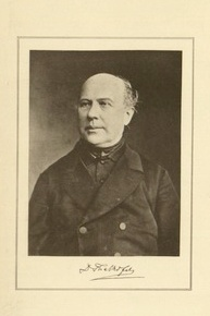 Valentin Thalhofer (1825-1891), katholischer Priester, Theologieprofessor, Rektor des Georgianums München